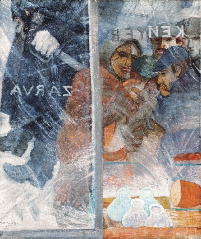 olaj, tempera, ezüst, vászon Szombathelyi Képtár